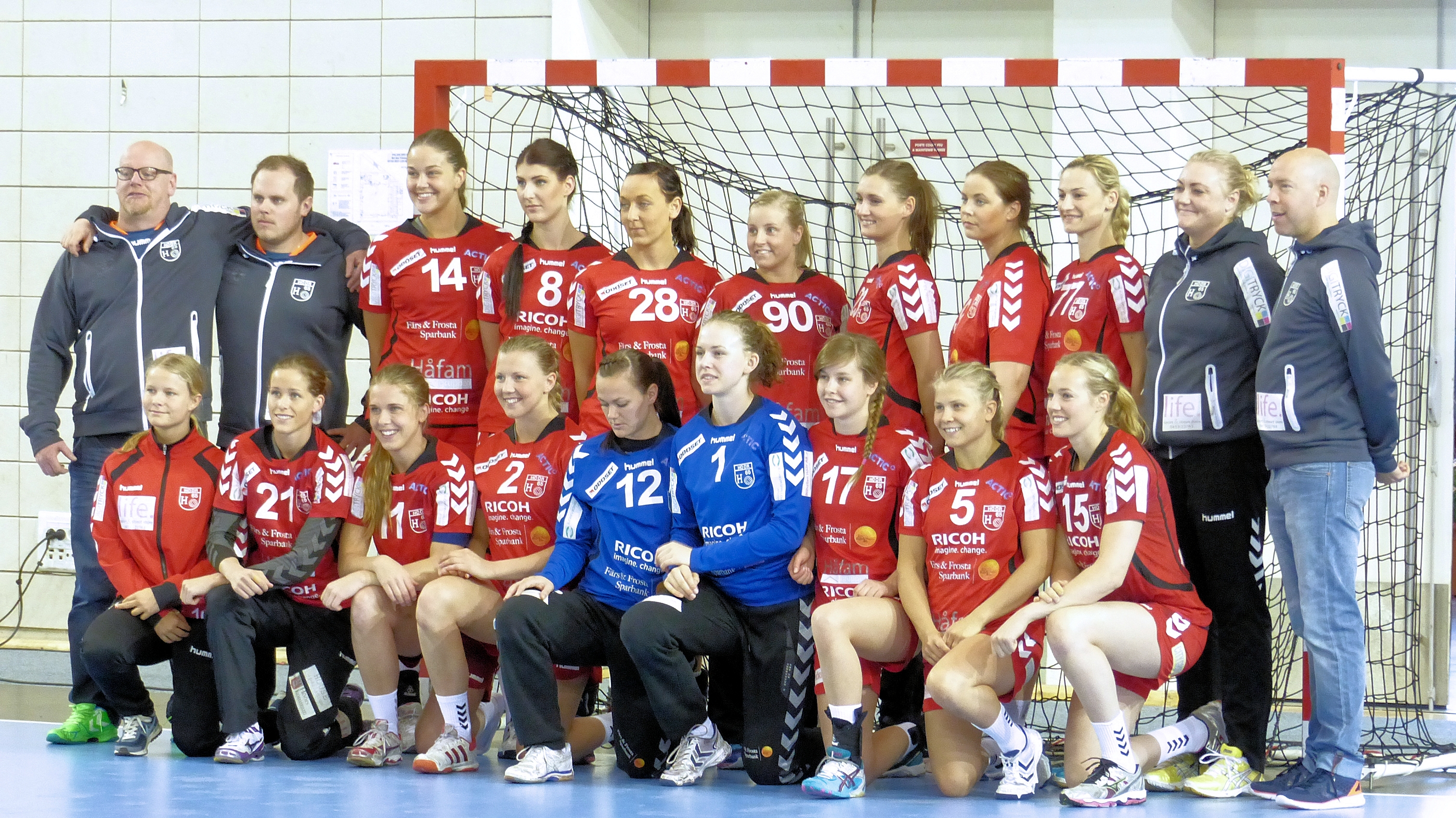 L'équipe suédoise de handball de H 65 Höör. Le 11 mai 2014 lors de la finale retour de la Coupe Challenge 2013-2014 à Issy Les Moulineaux.